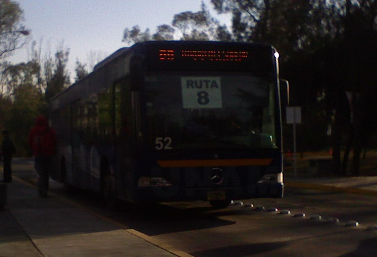 PumaBús ruta 8 en la parada Camino Verde frente al Anexo de Ingenieria